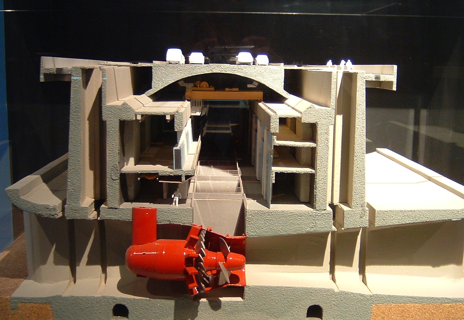 Maquette de la coupe du barrage de la Rance ( France) (Espace découverte du barrage EDF)